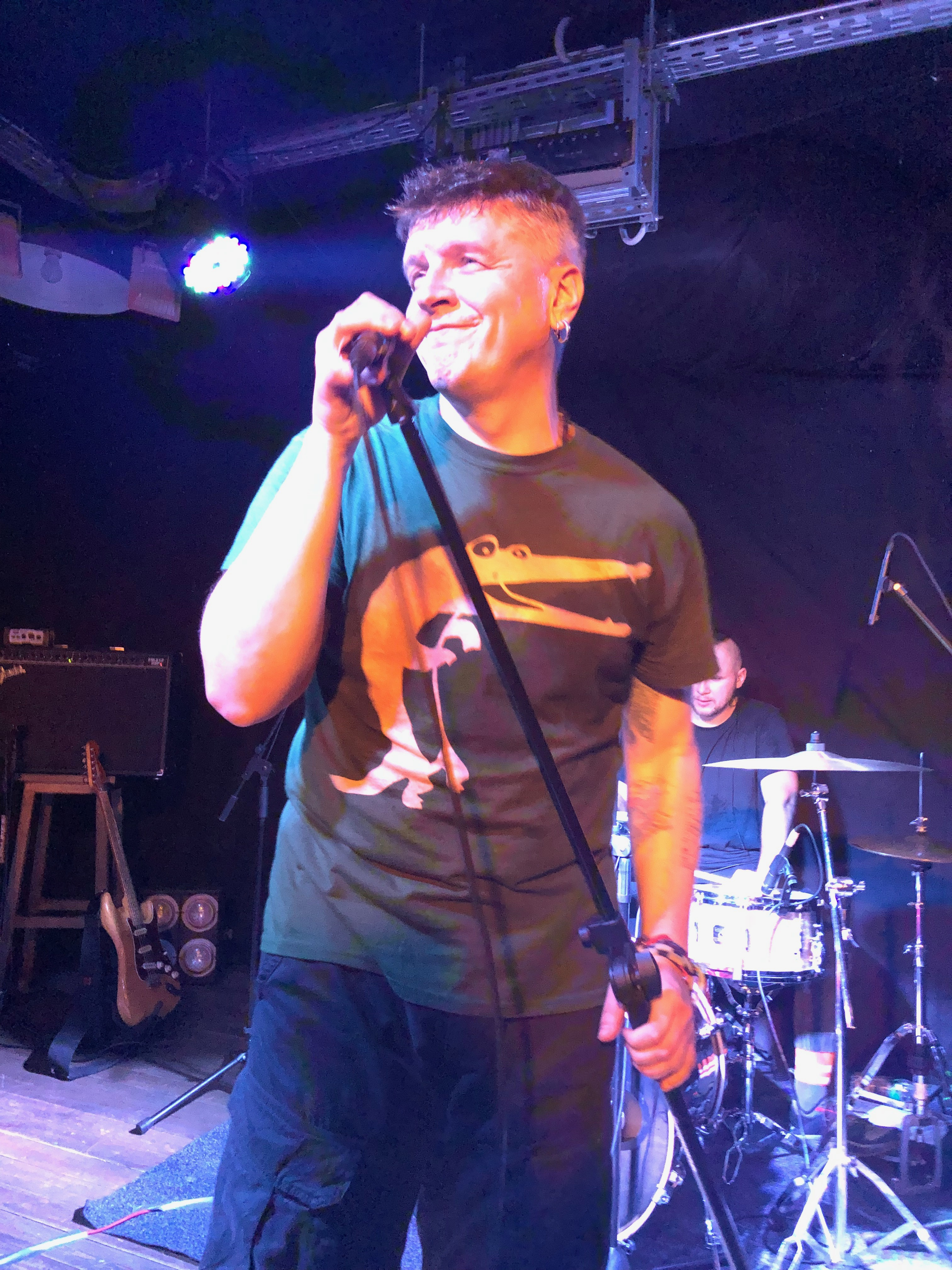 Вагоновожатые. Презентация альбома "Референс". Харьков, Art Area ДК, 8 декабря 2018.